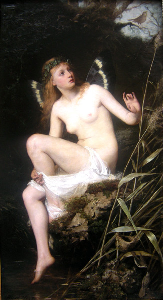 Friedrich Wilhelm Theodor Heyser (1857 – 1921): Waldnymphe